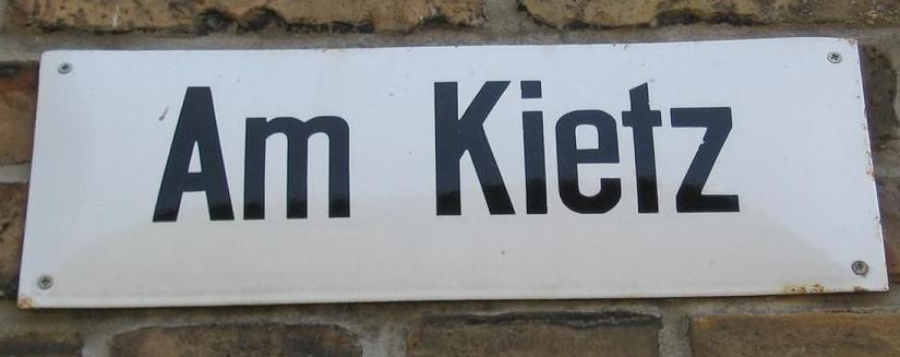 Schild "Am Kietz", Gröben, Brandenburg Selbst fotografiert, August 2004 GNU FDL Lienhard Schulz